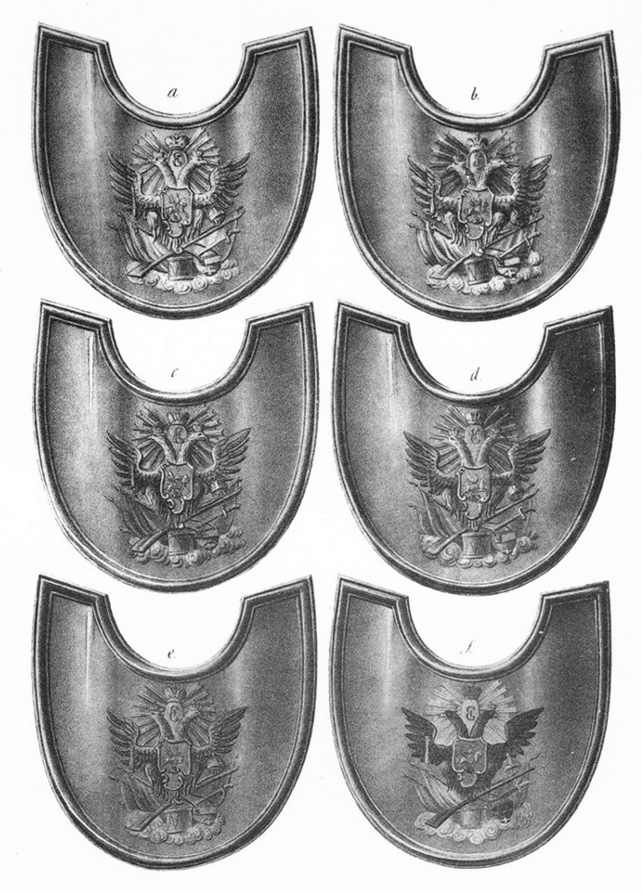 Офицерские знаки полков обсервационного корпуса. a) прапорщика,b) подпоручика, c) поручика, d) капитана, e) майора и подполковника, f) полковника.